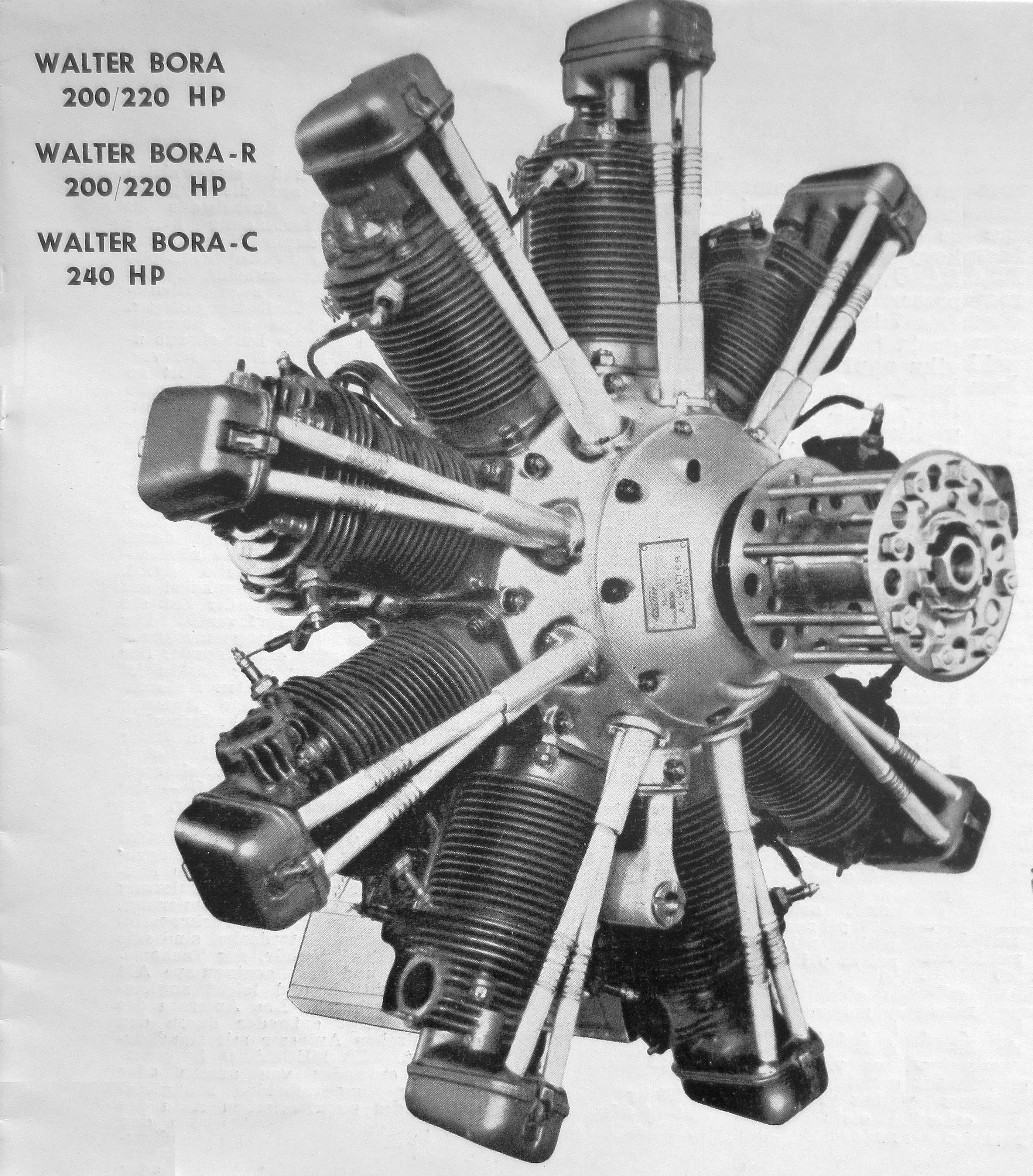 letecký motor Walter Bora I, Bora-R, Bora-C